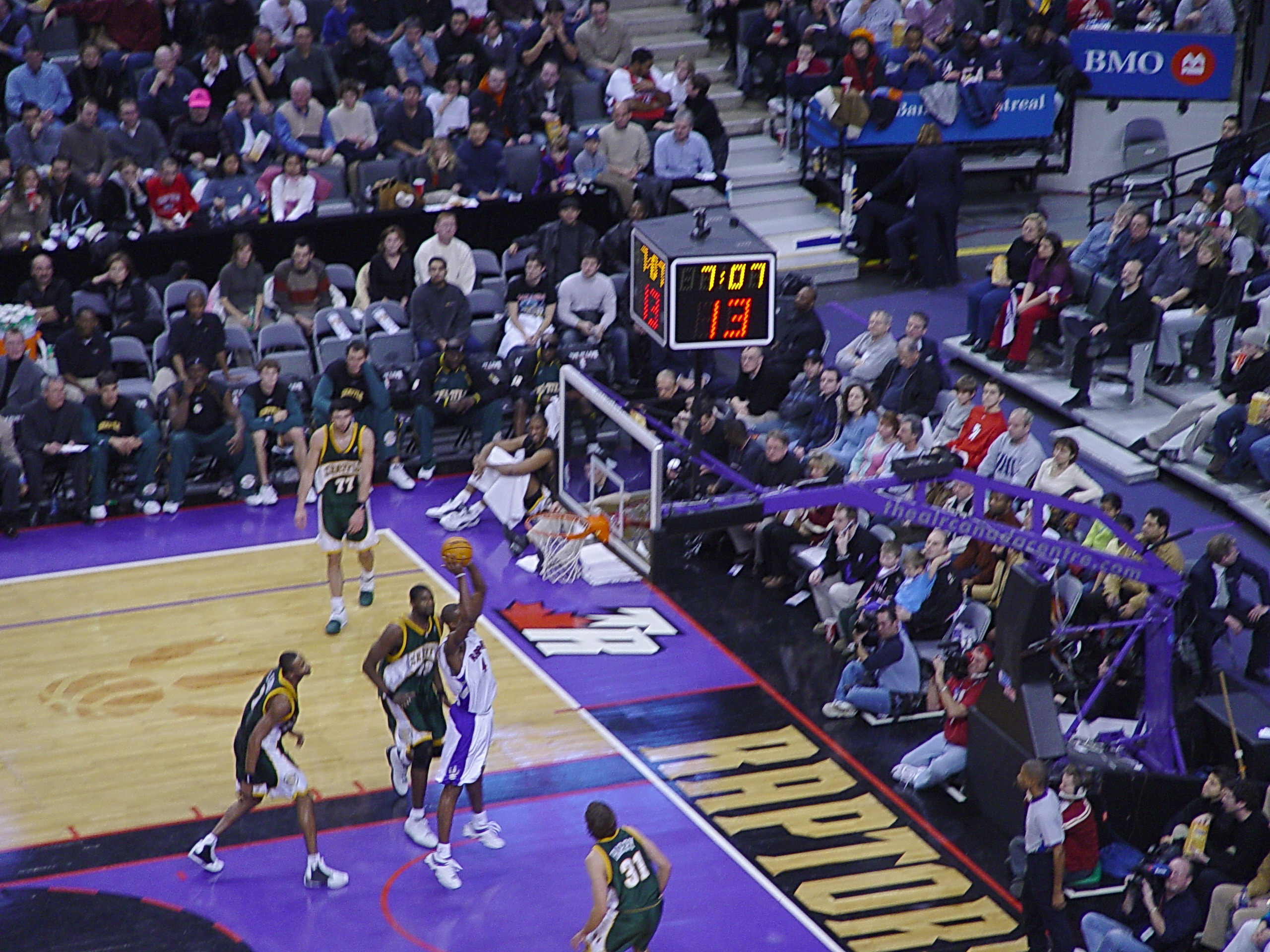 20031207_RaptorsVSonics_4079